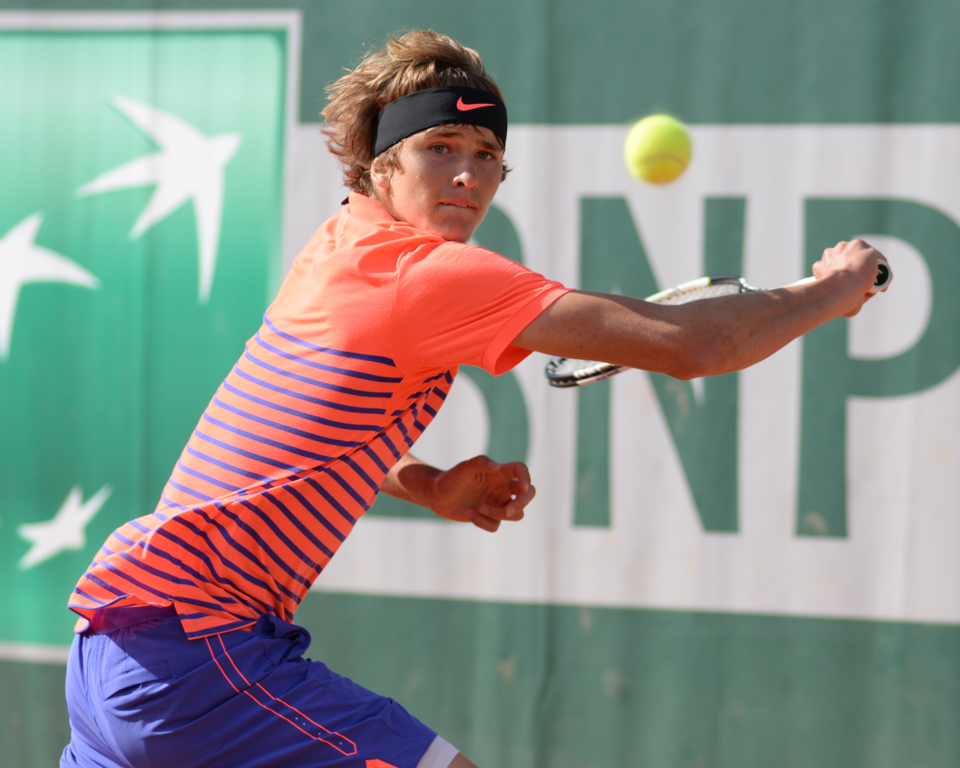 Alexander Zverev